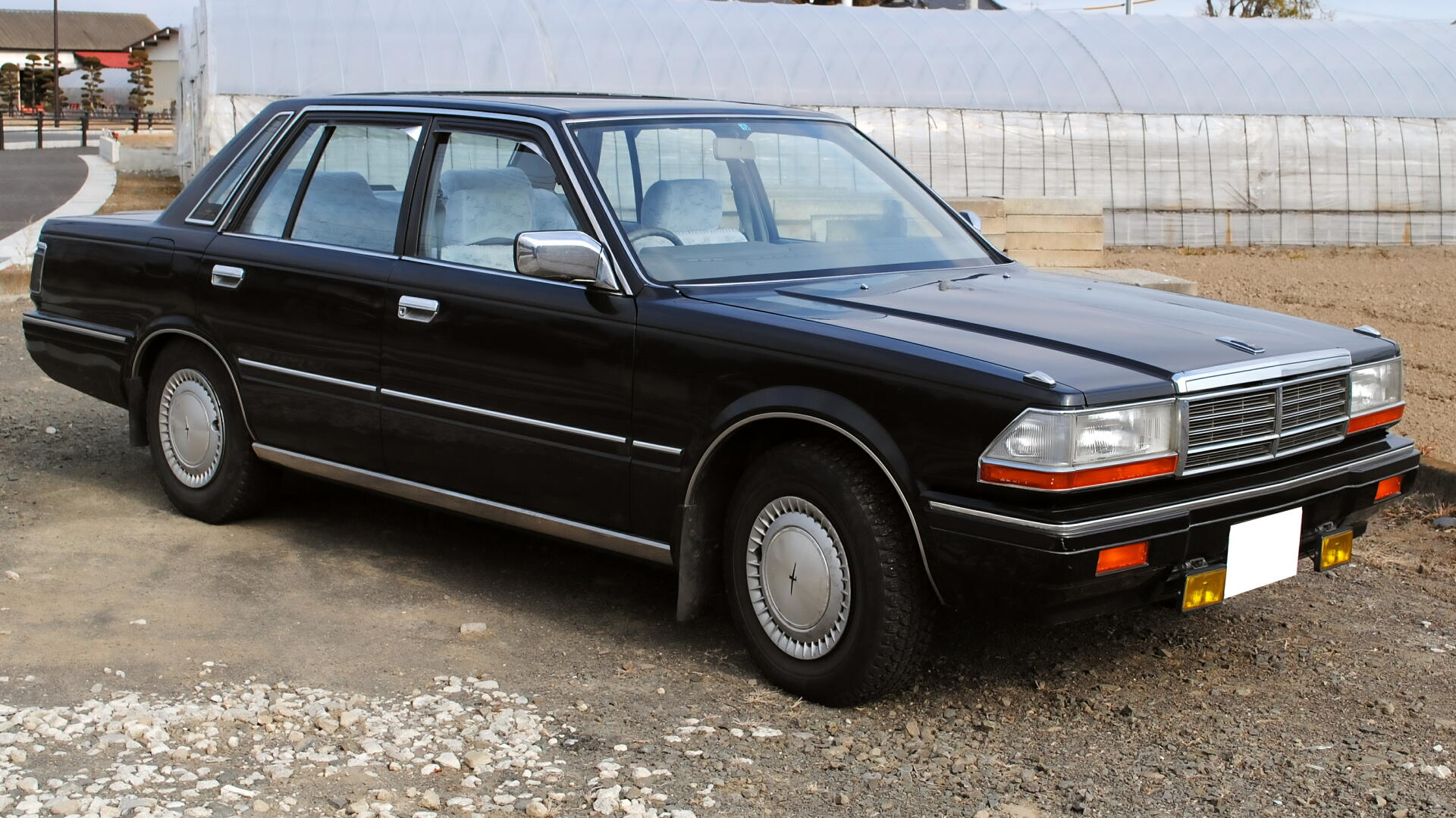 日産・グロリア（Y30型セダン）